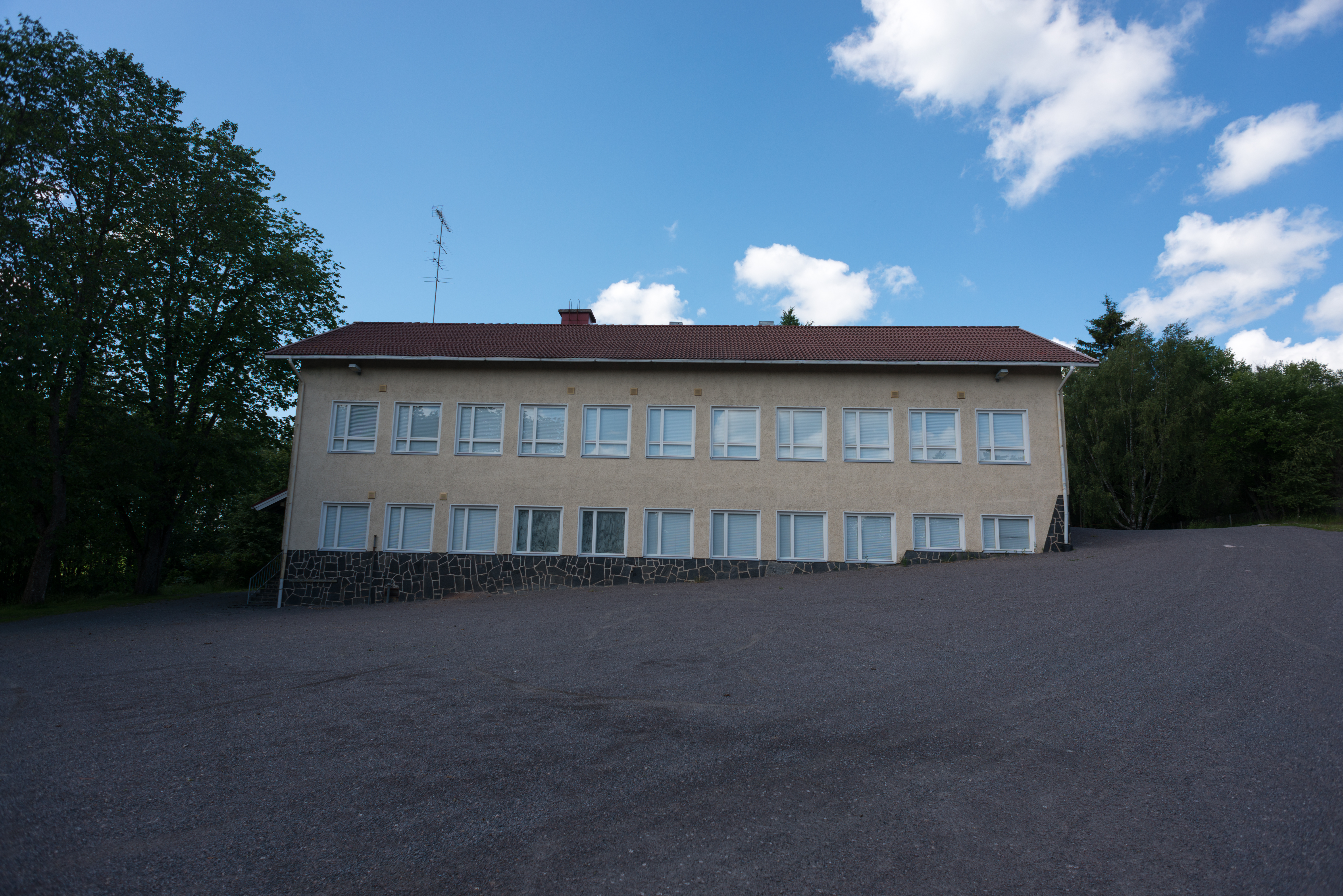 Saurun koulu Perniössä